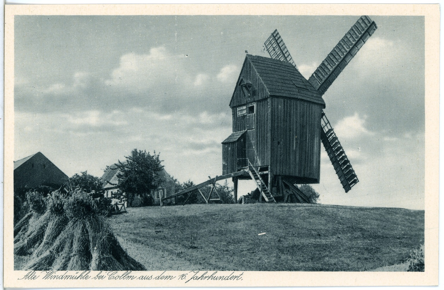 Collm; Alte Windmühle This postcard is from publisher Brück & Sohn in Meißen ( This postcard has a unique number 24491 and is available in a higher resolution at the publisher. This images was uploaded in a cooperation project between Wikipedians and the publisher.